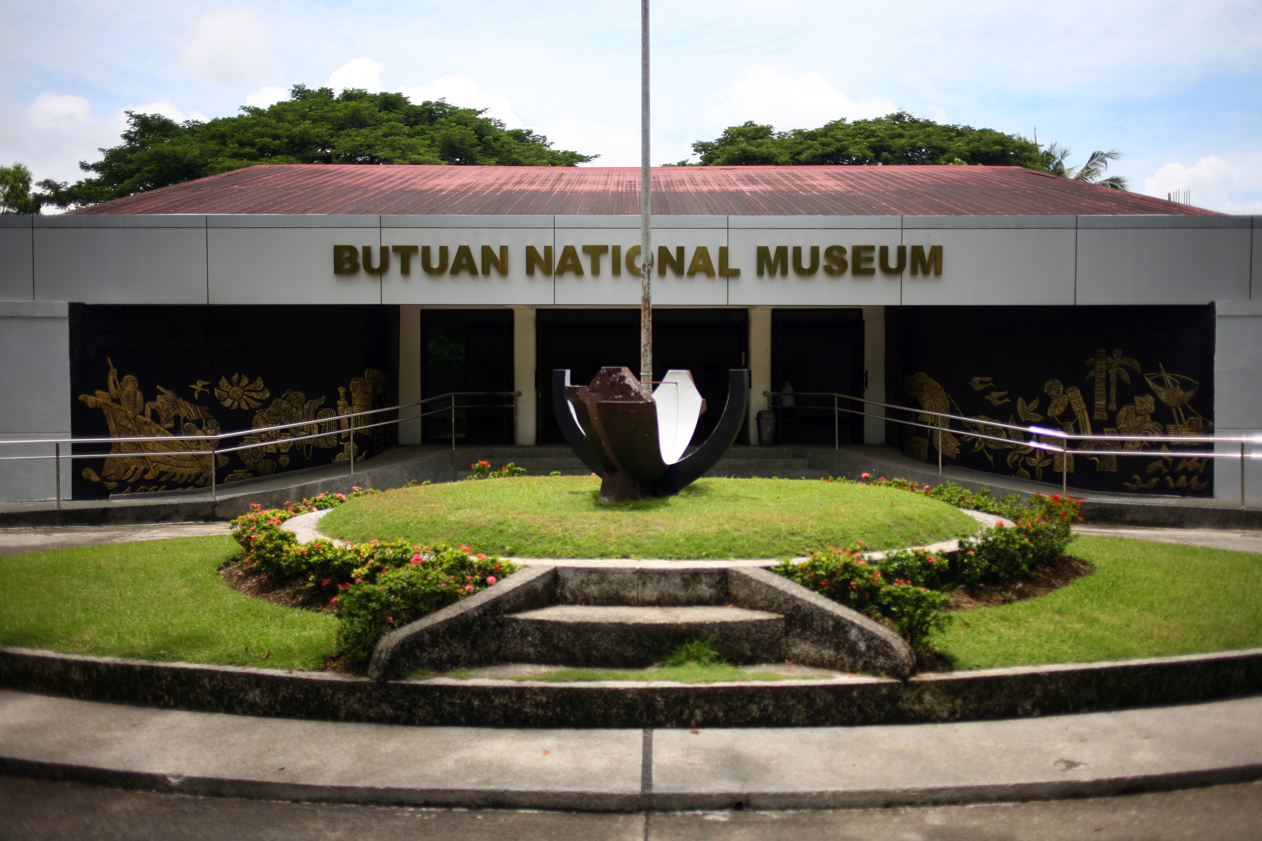 Museo nazionale di Butan, Agusan del Norte, Filippine